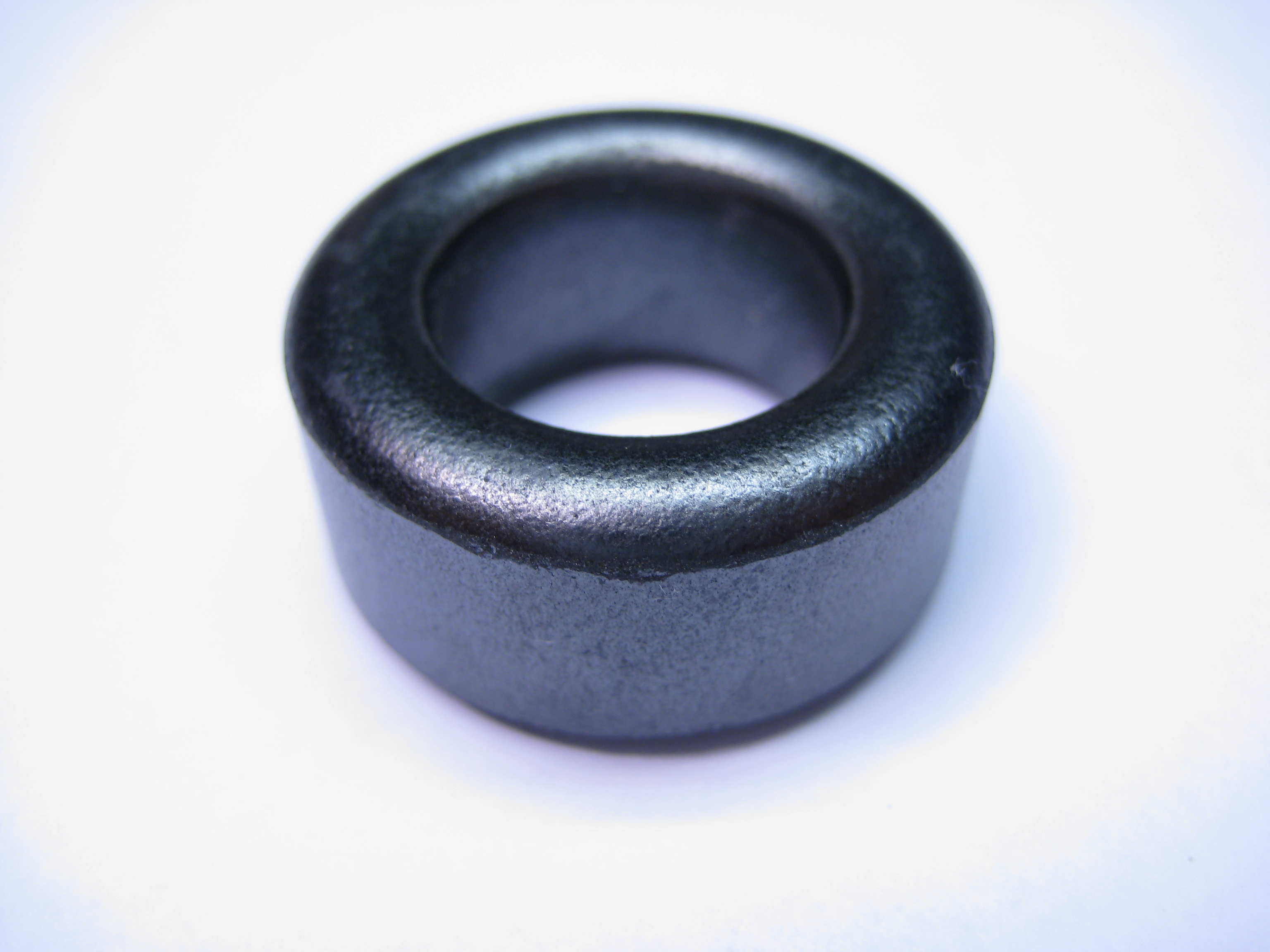 Ferrite torroid